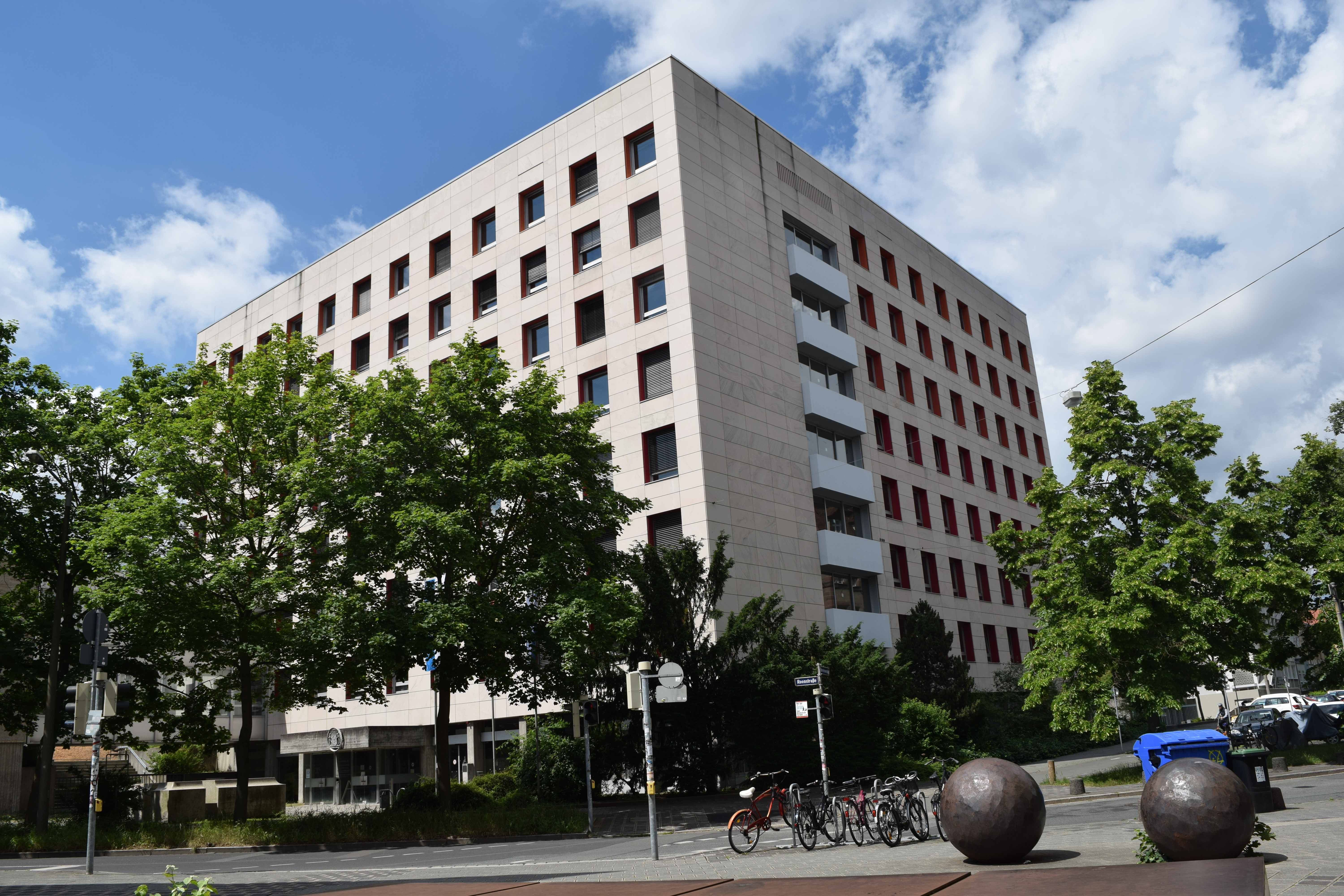 Gebäude des Arbeitsgerichtes Nürnberg in der Roonstraße 20